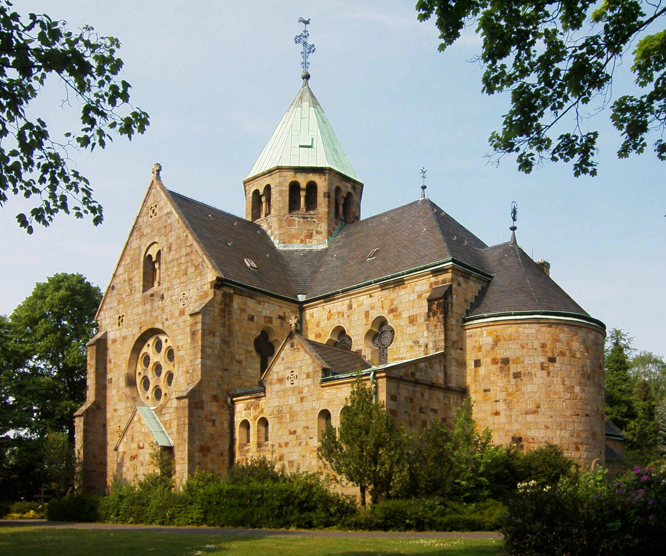 Katholische Pfarrkirche St. Mariä Heimsuchung in HauenhorstThis is a photograph of an architectural monument.It is on the list of cultural monuments of Rheine